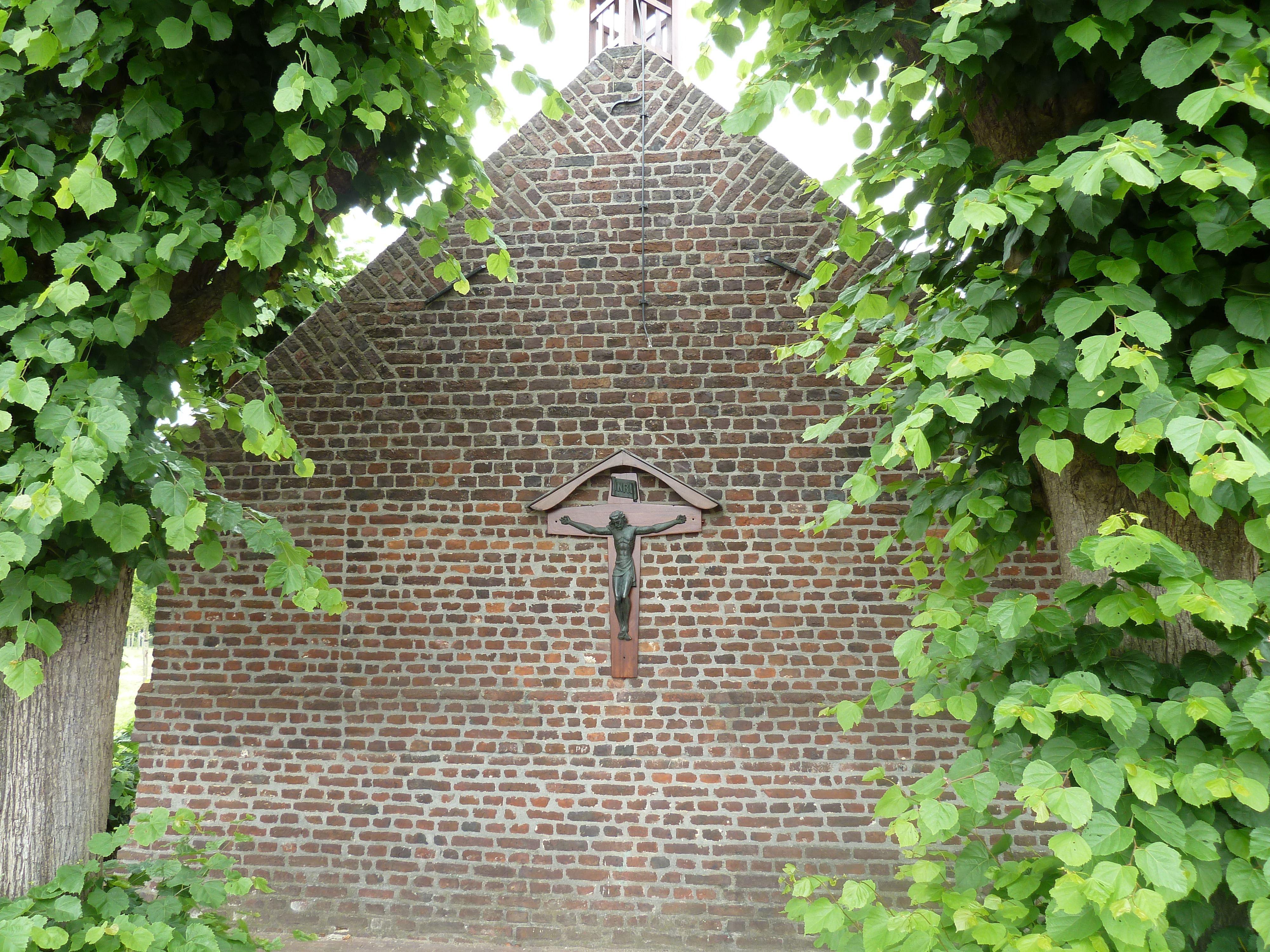 Heierkapel, Swalmen, Nederland